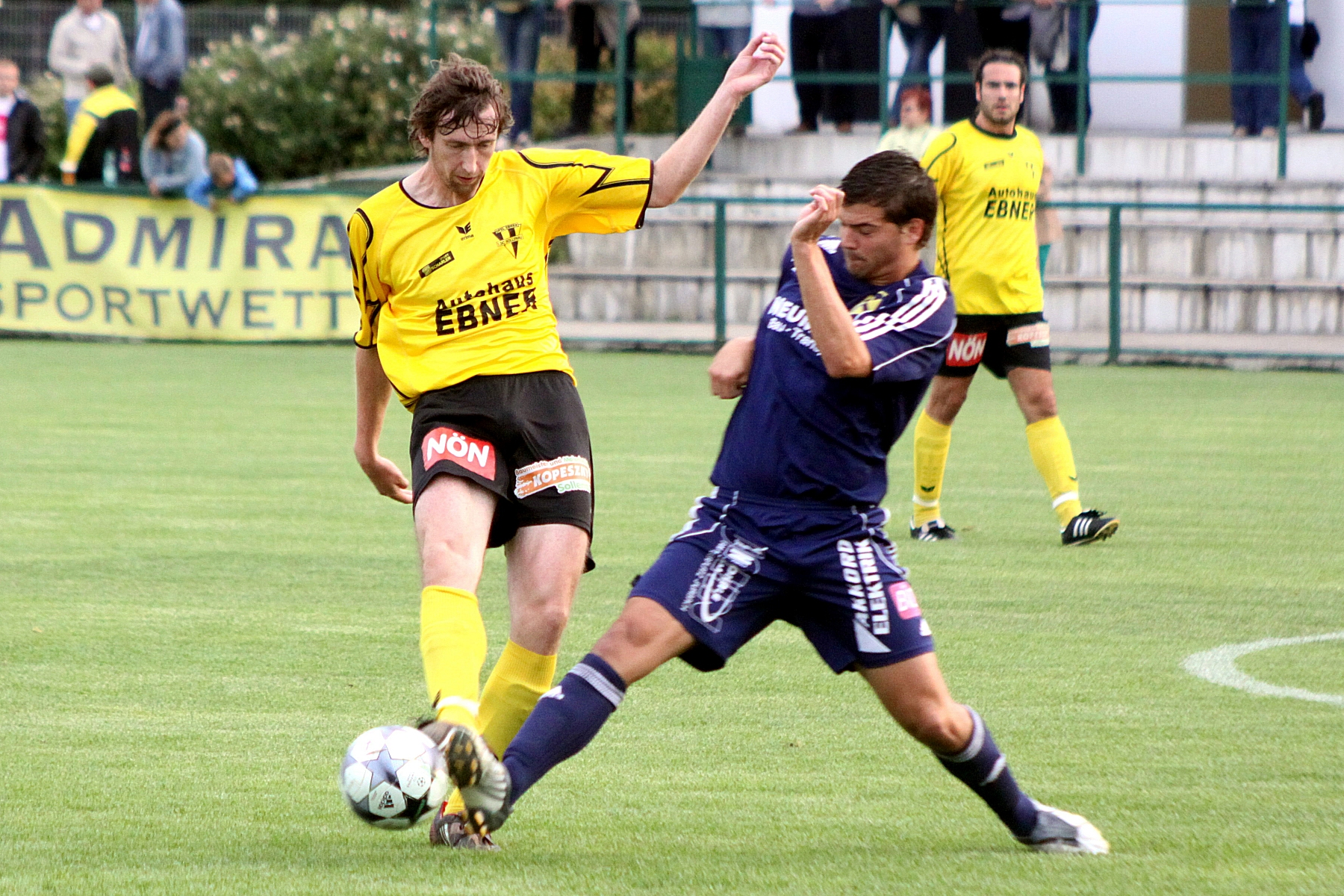 Österreichischer Fußball-Cup 2010/11 - Christian Banovits (1. SC Sollenau, links) im Zweikampf mit einem Spieler des UFC Purbach